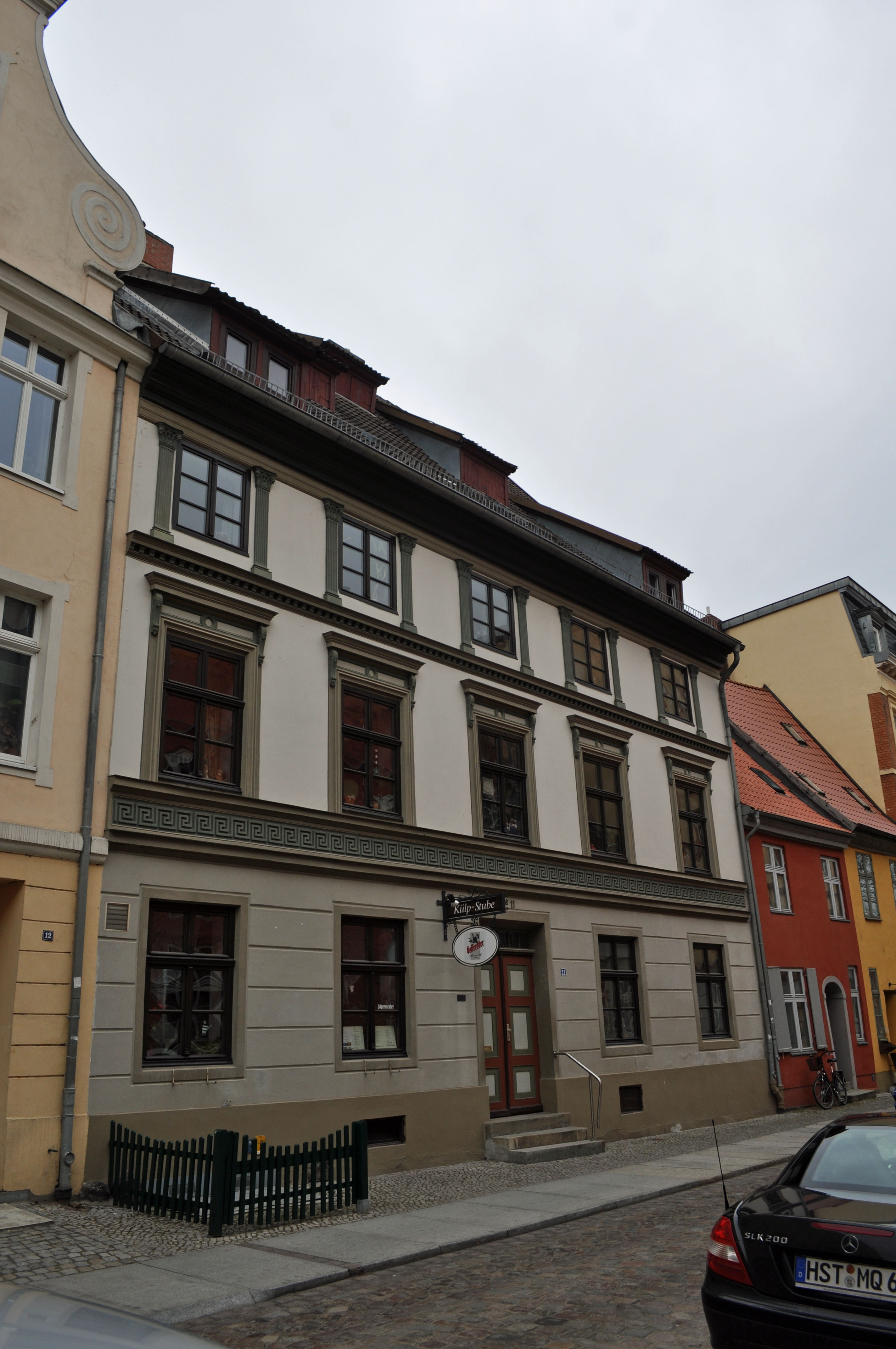 Gebäude bzw. Gebäudedetail in Stralsund. Straße und Hausnummer siehe Dateiname.